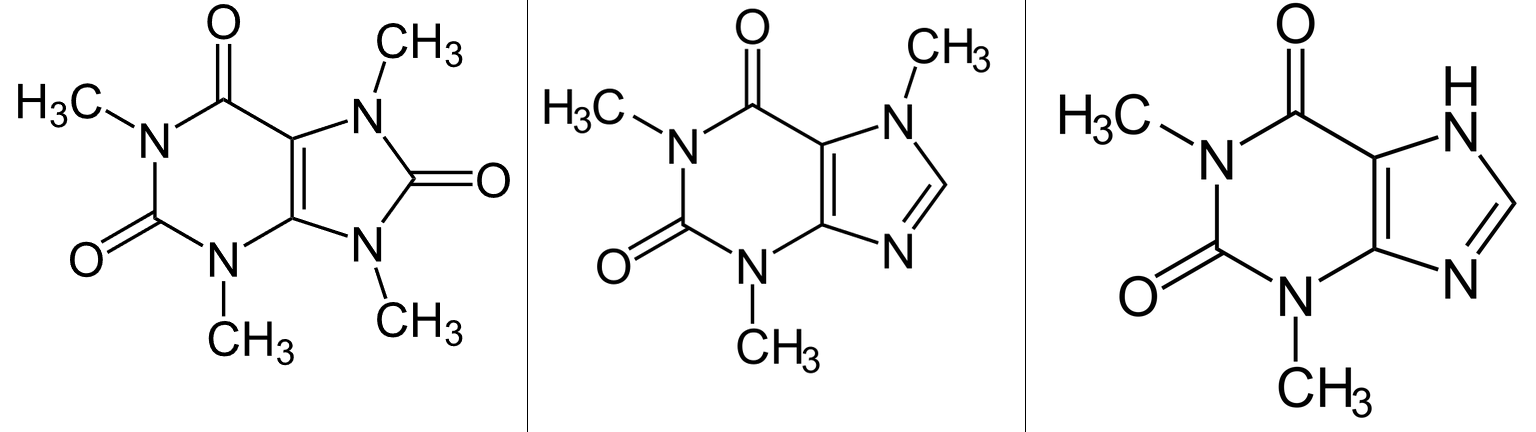 Formules chimiques